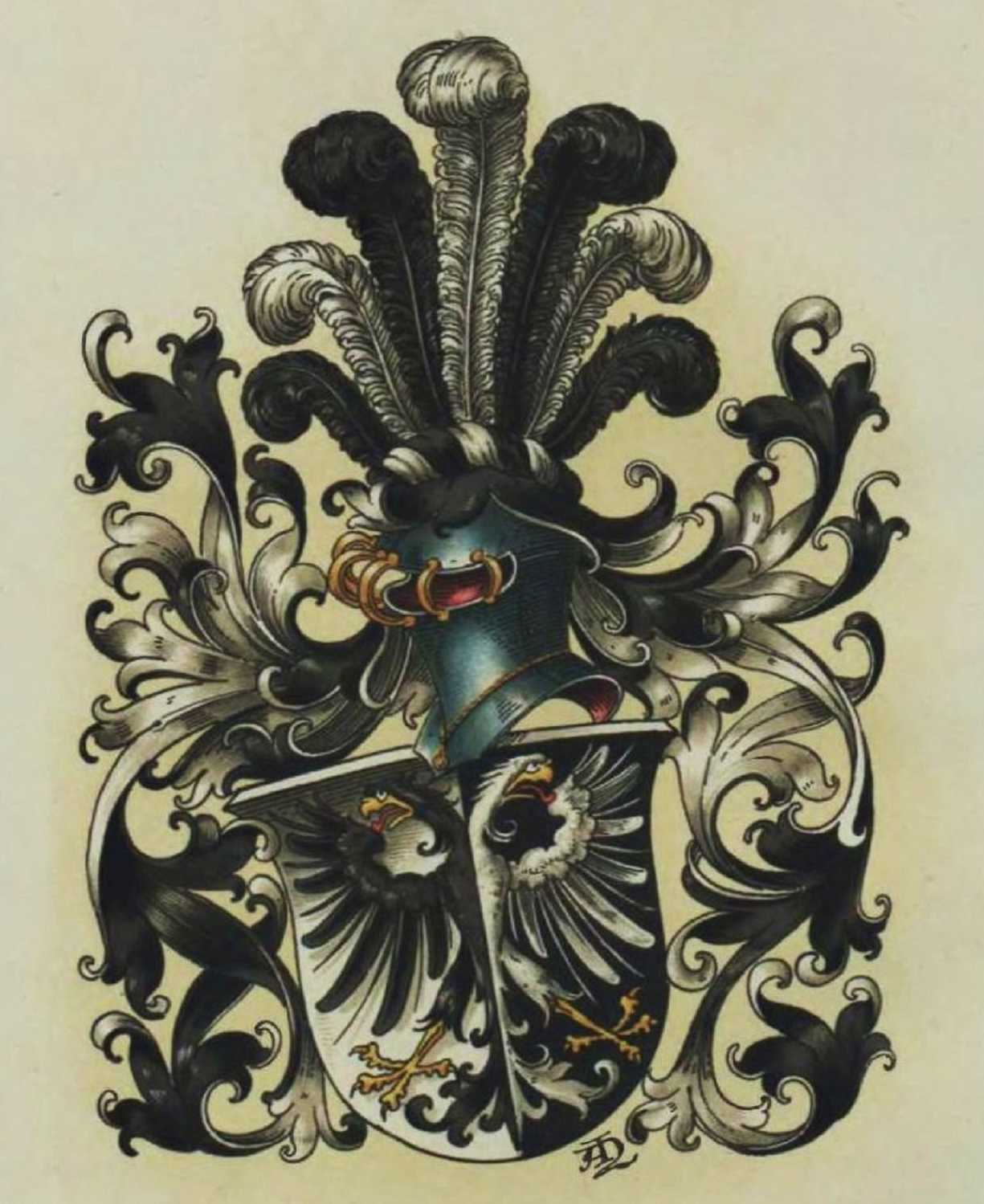 Stammwappen der v.Zitzewitz (und der stammverwandten v.Zittwitz)